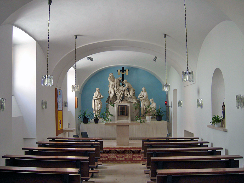 Kapelle in der Kirche St. Ulrich, Wien